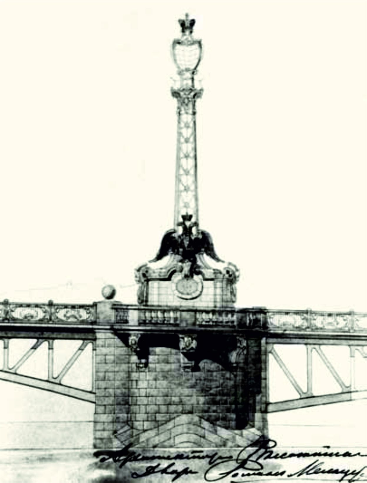 Проект упрощенного фонарного столба для опор разводного пролета Дворцового моста через Неву в Петербурге. Архитектор Р.Ф.Мельцер, 1913 г.